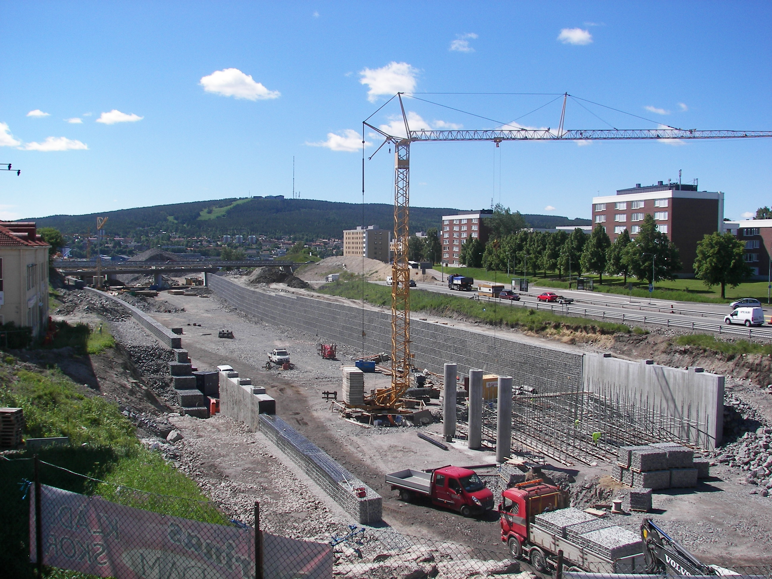 Bygget av anslutningsvägarna till Sundsvallsbron norrifrån sett från Skönsbergs centrum i Sundsvall.